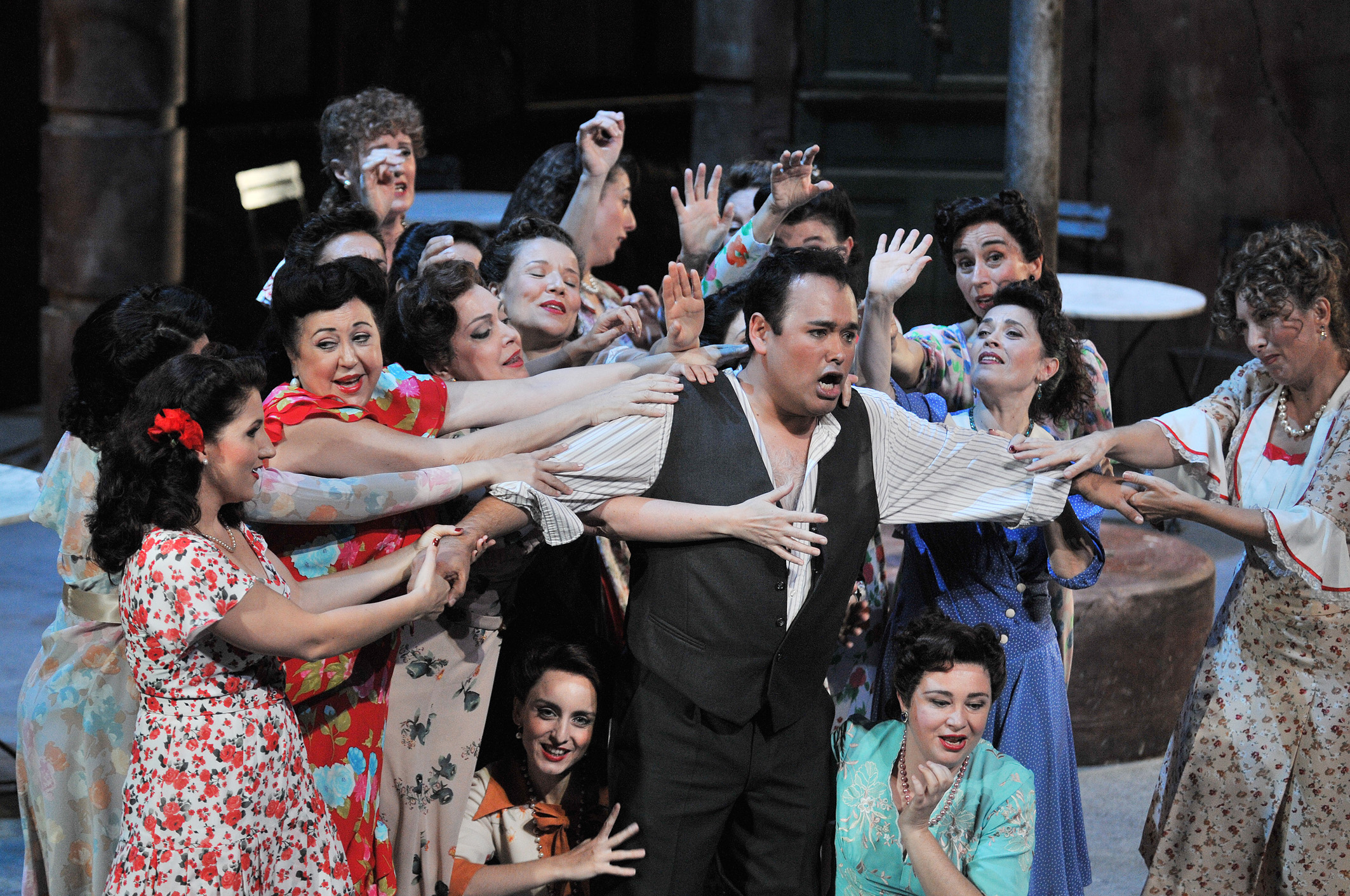 Javier Camarena, tenor, "Nemorino" en El Elixir de Amor de Donizetti, Gran Teatro del Liceu, Barcelona, España. 2012